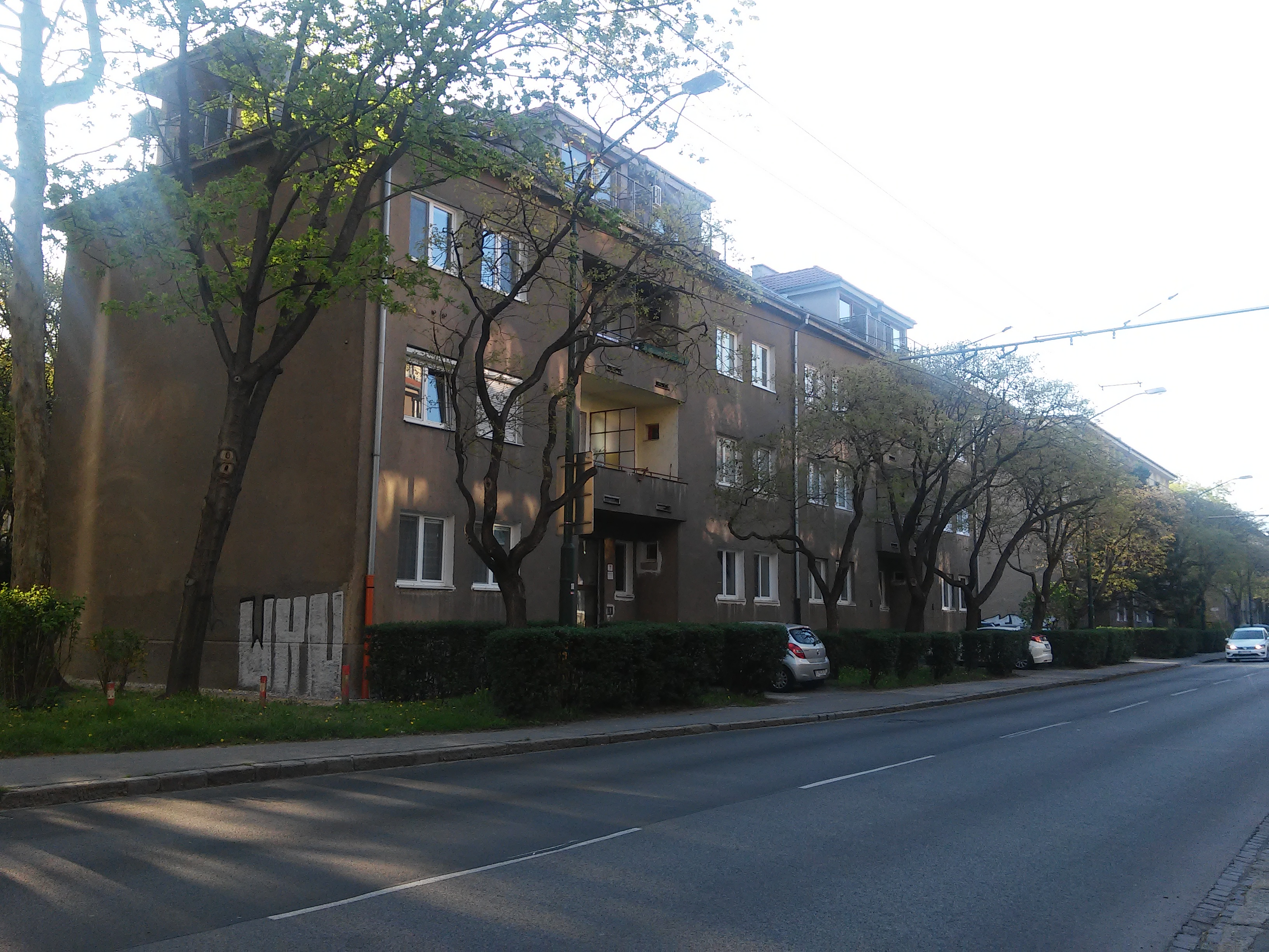 Svätoplukova, Bratislava